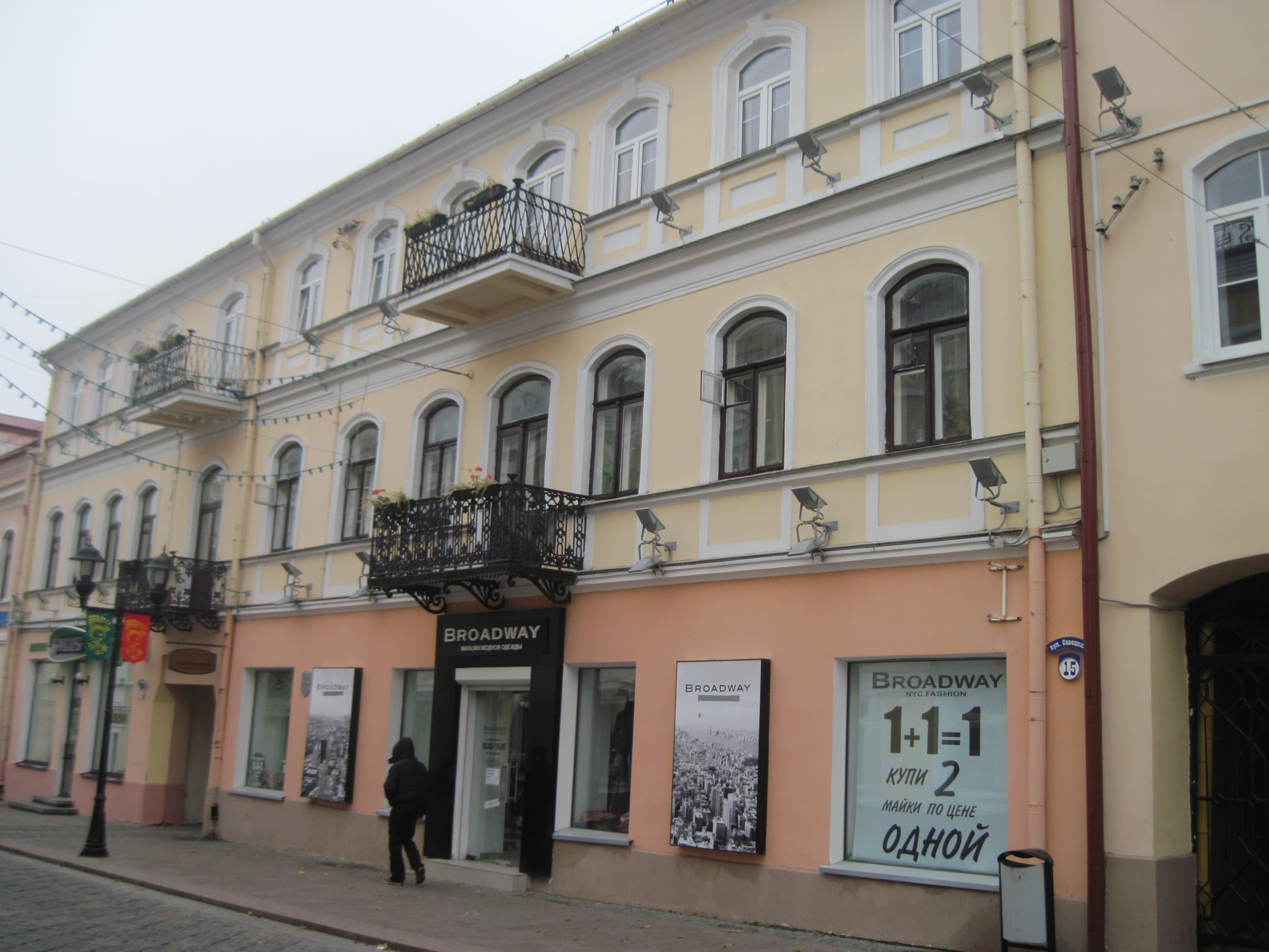 Беларуская (тарашкевіца): Будынак №15, вул. Савецкая, Гродна